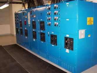 Große Online USV zur Versorgung von Servern